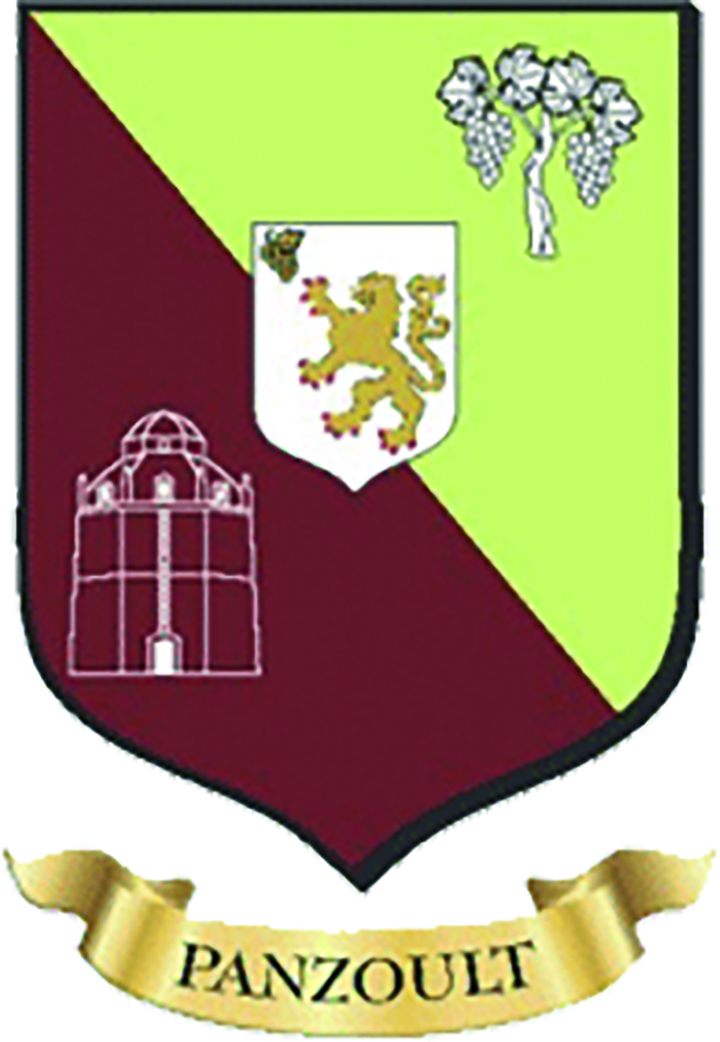 Logo de Panzoult